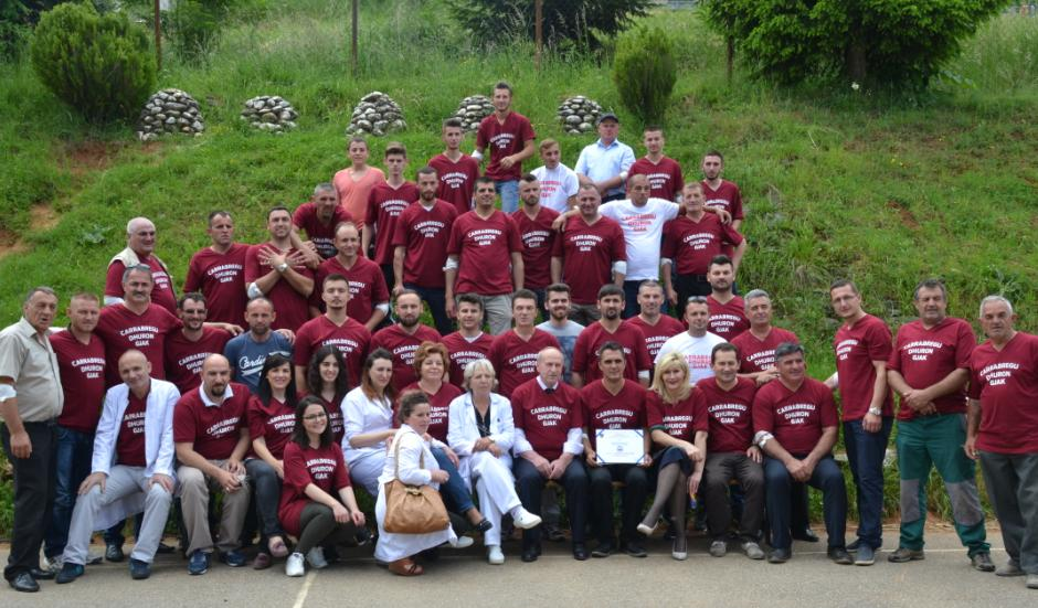 Disa nga dhuruesit e gjakut 29.05.2016